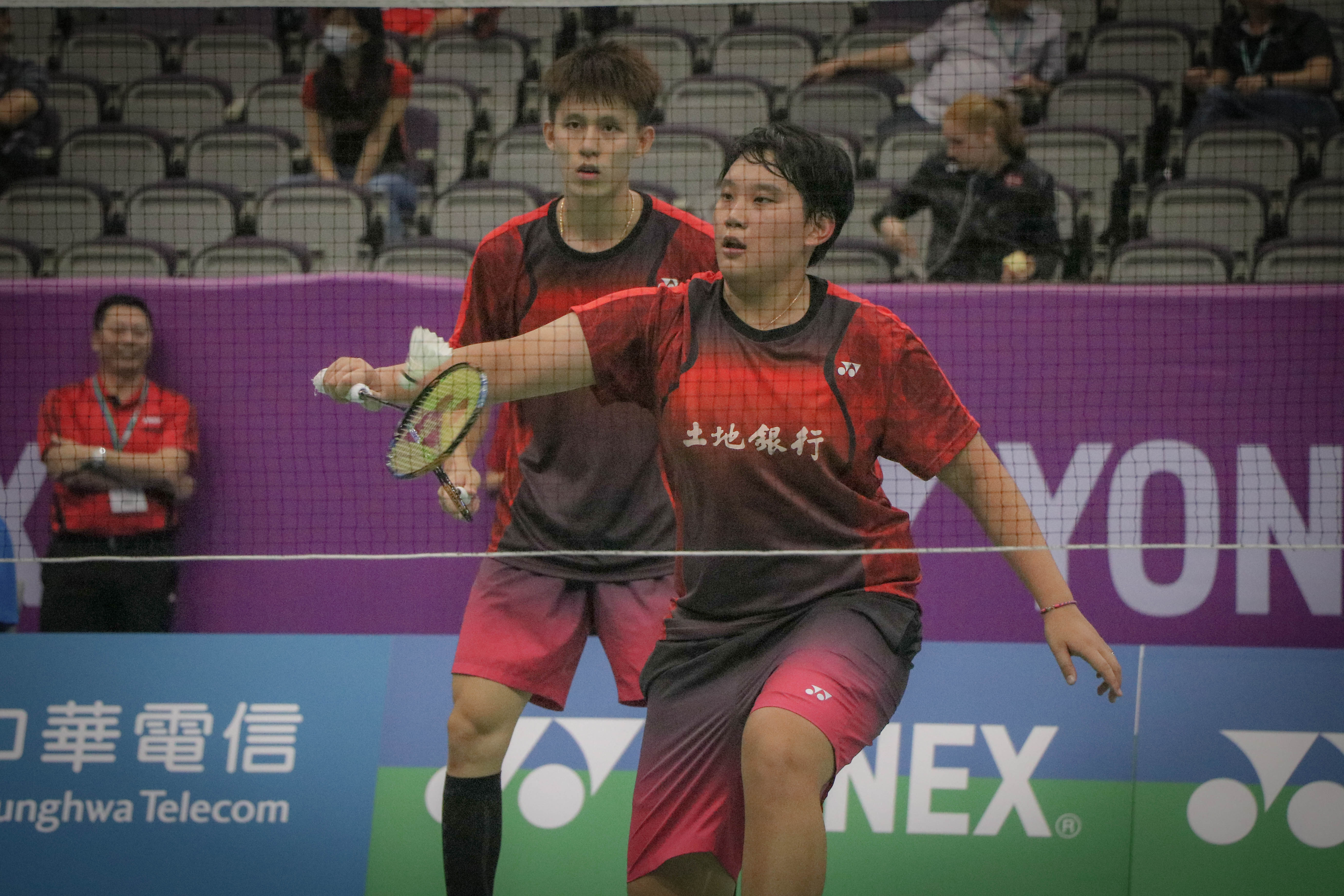 2018 台北OPEN 10/03